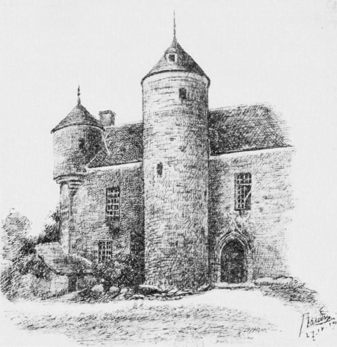 Le château de Coadezlan (Coadelan), commune de Prat (dessin vers 1910, J. Baudry, La Fontenelle le ligueur et le brigandage en Basse-Bretagne pendant la Ligue